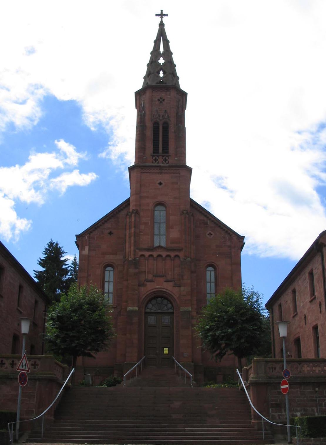 Kath. Kirche St. Venantius, Wertheim